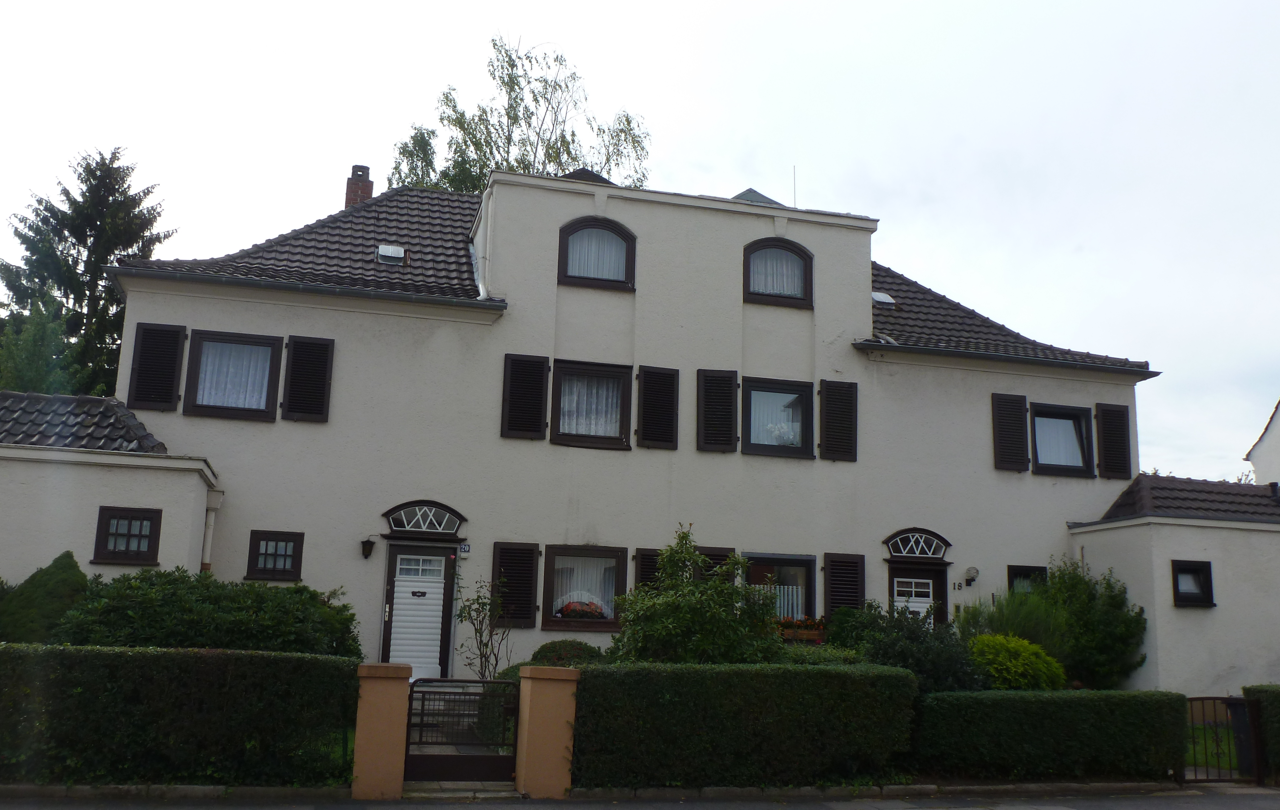 Haus Grafenmühlenstr. 18-20 in Köln-Dellbrück, Denkmal-Nr. 1534 und 2685